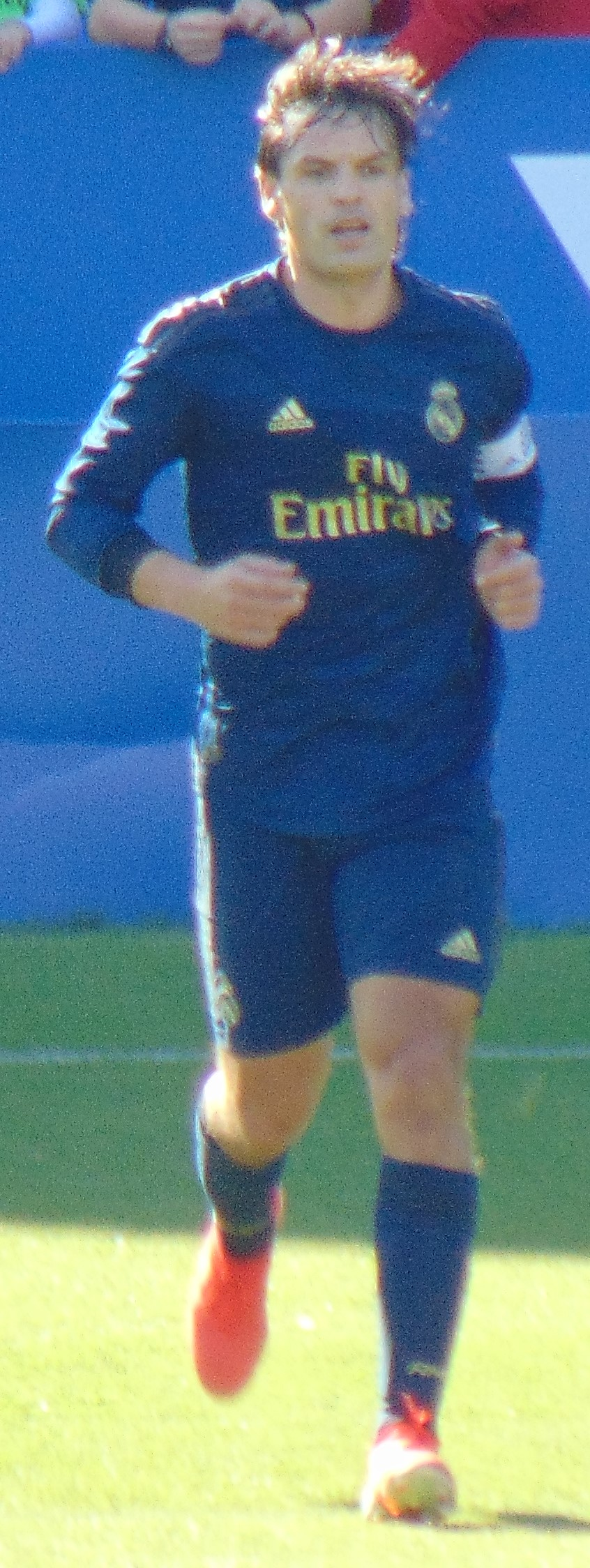 Fernando Morientes con la elástica del Real Madrid disputando un encuentro de veteranos a favor de los niños que padecen cáncer. 24 de noviembre de 2019. Estadio de La Romareda.